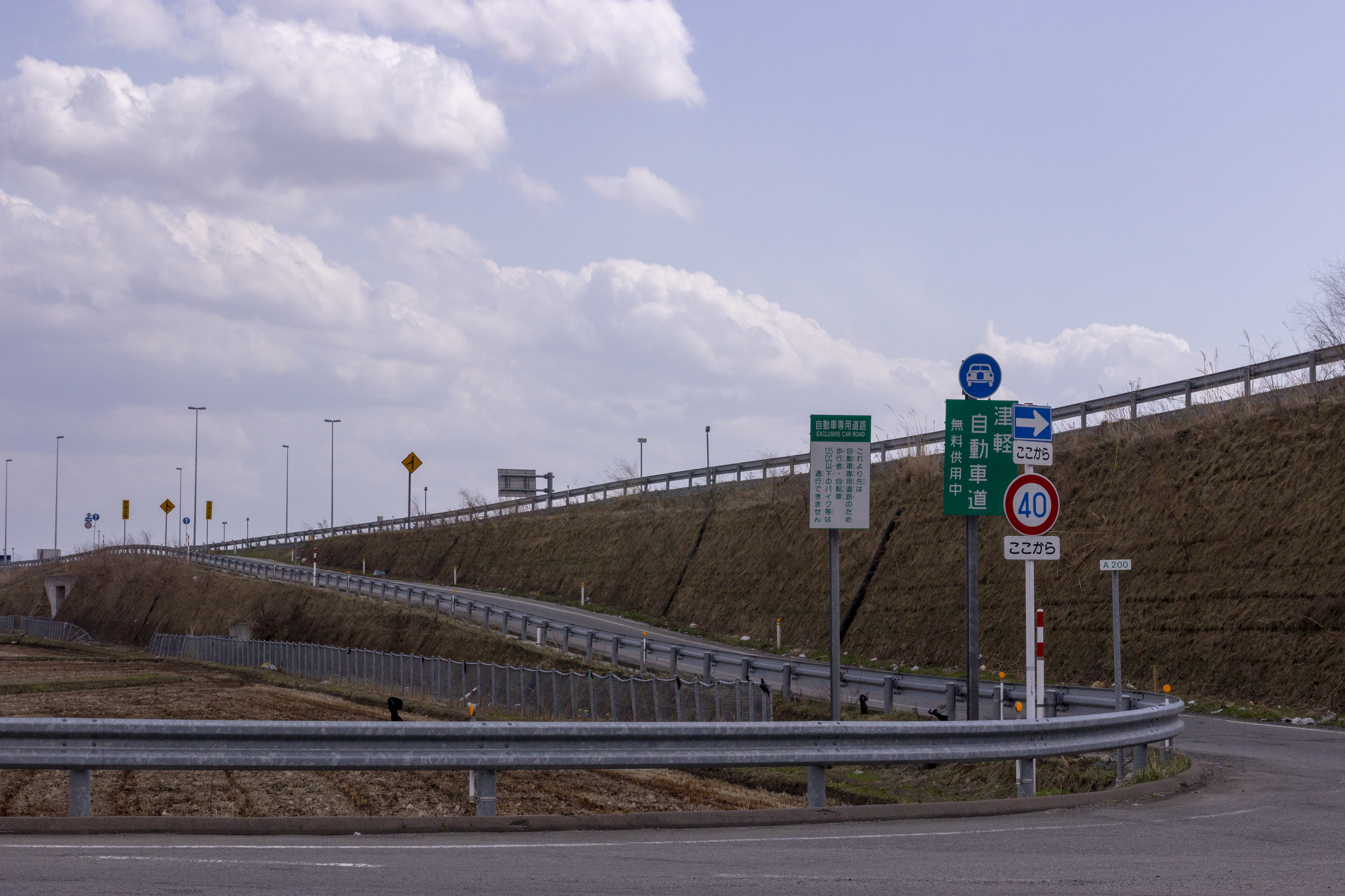 津軽自動車道 - 五所川原IC - 浪岡方面行入口